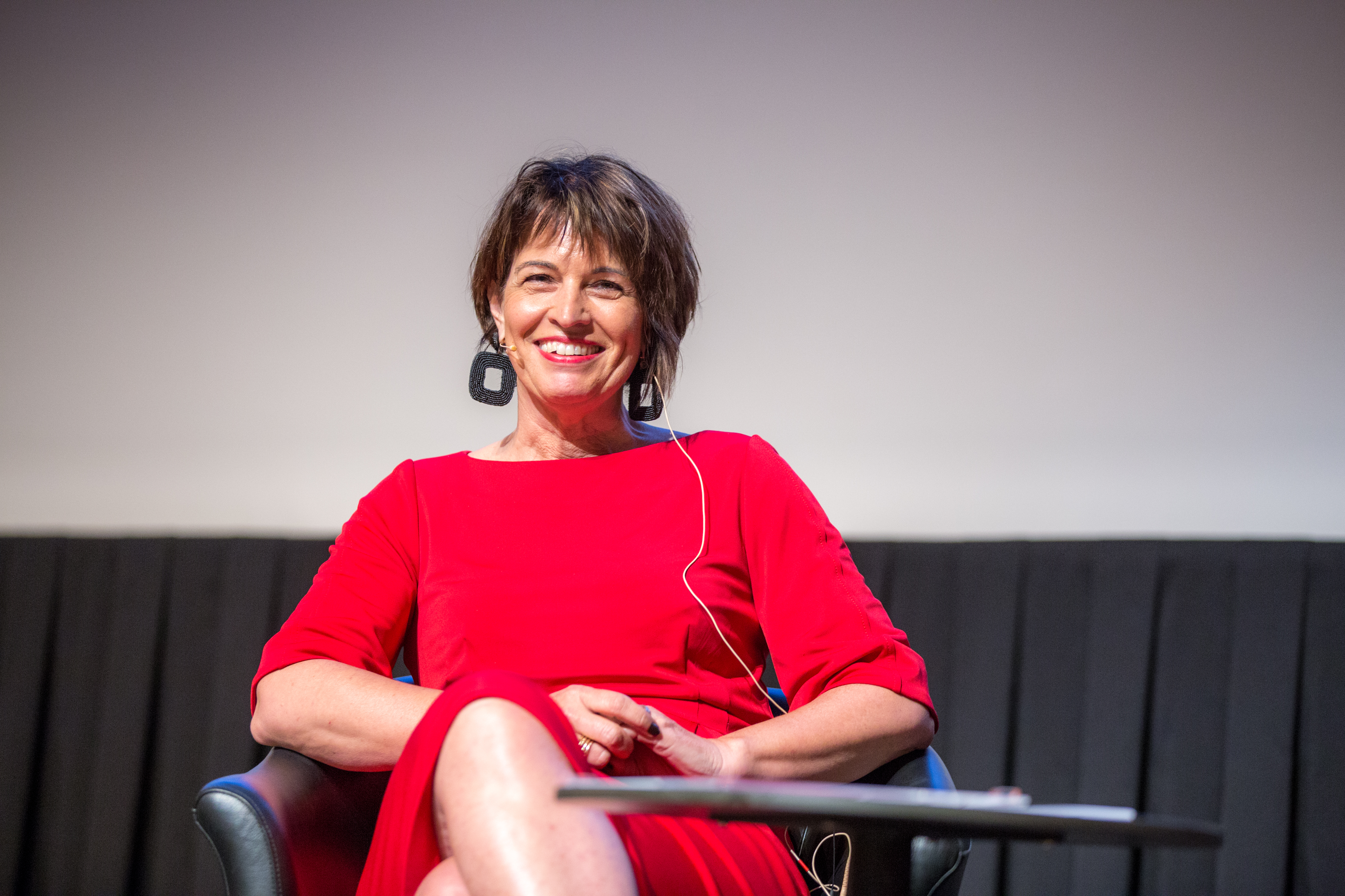 Die damalige Bundesrätin, Doris Leuthard, an der DV der CVP Schweiz.